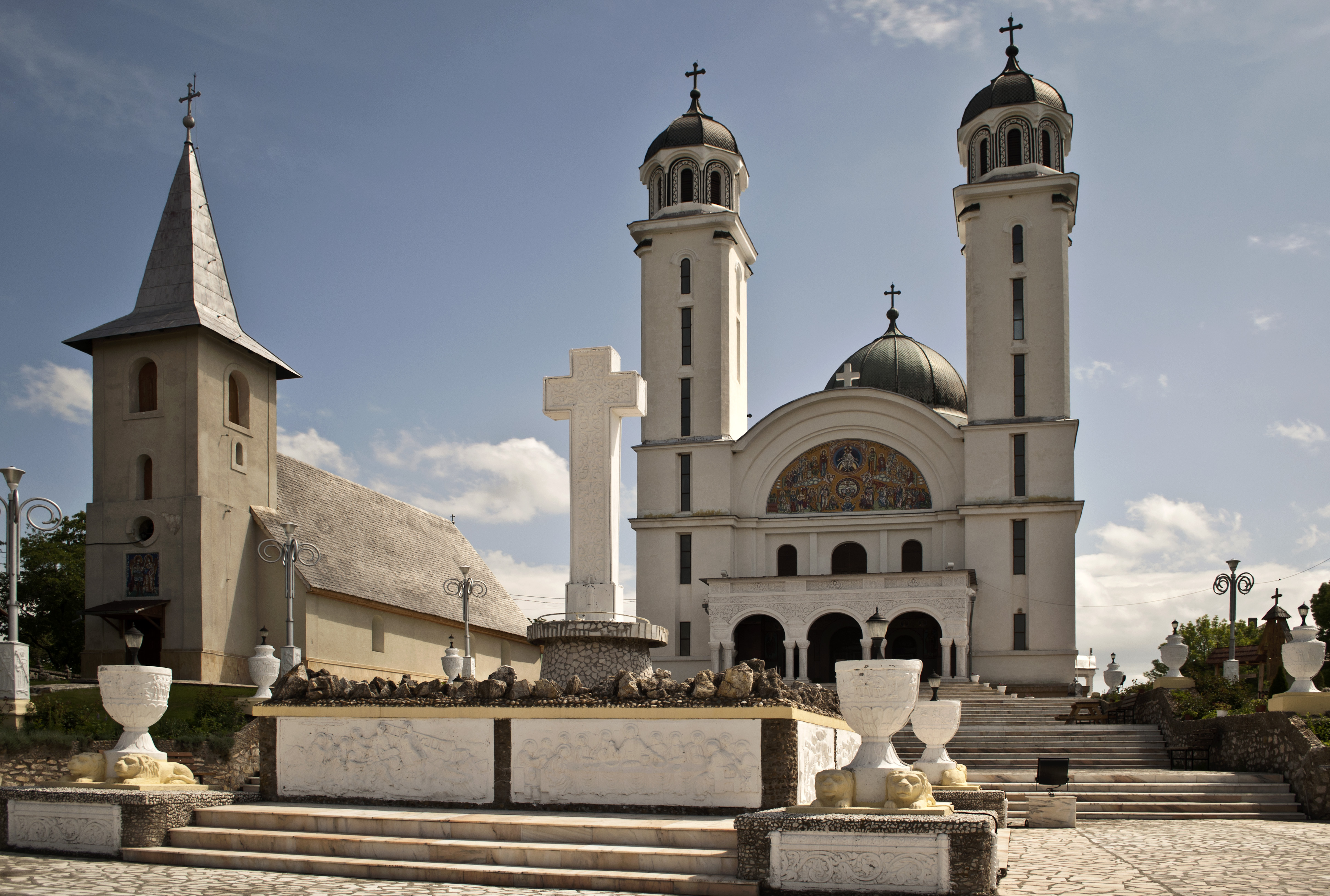 Cunoscuta sub denumirea de Catedrala Ortodoxa din Ghelari, biserica poarta hramul Sfintii Apostoli Petru si Pavel. Constructia edificiului a inceput sub indrumarea parintelui Nerva Florea, in anul 1939.